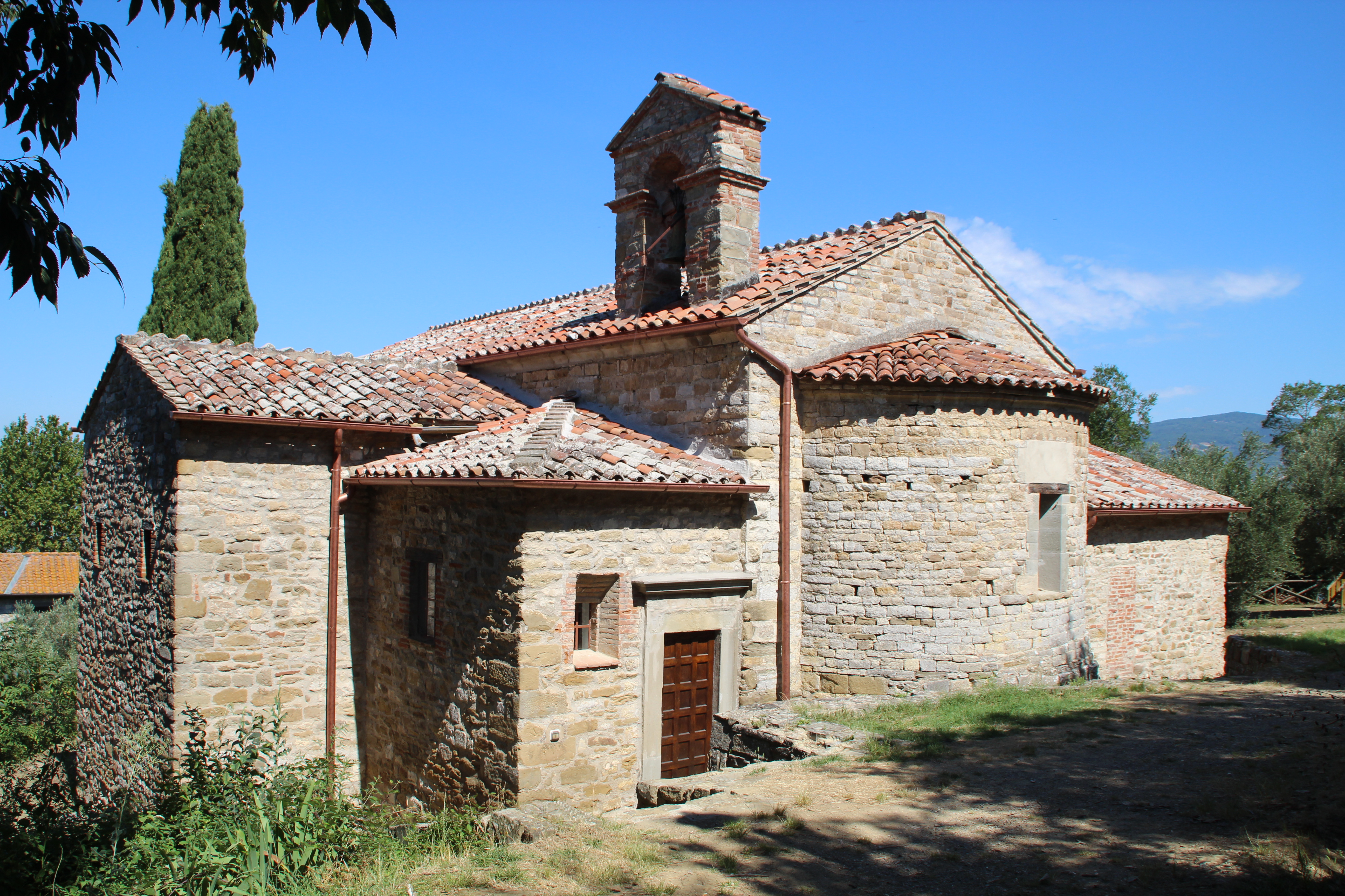 Isola Maggiore Kirche San Salvatore